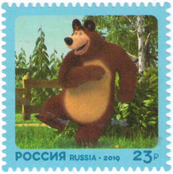 № 2557-2559. Современный российский кинематограф. Мультфильм «Маша и Медведь»